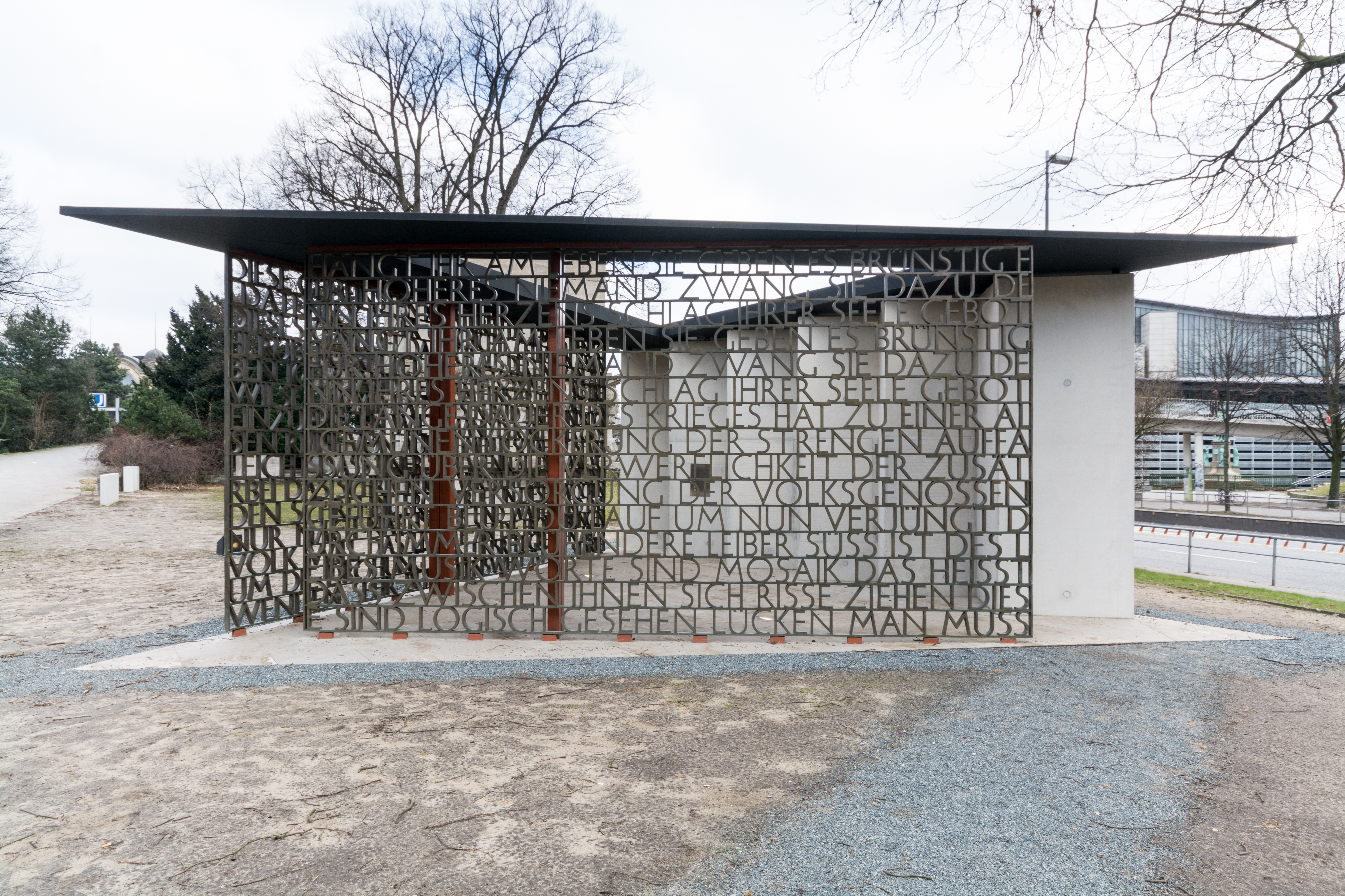 Gedenkort für Deserteure und andere Opfer der NS-Militärjustiz von Volker Lang, Teil der Denkmalanlage Dammtordamm in Hamburg-Neustadt.